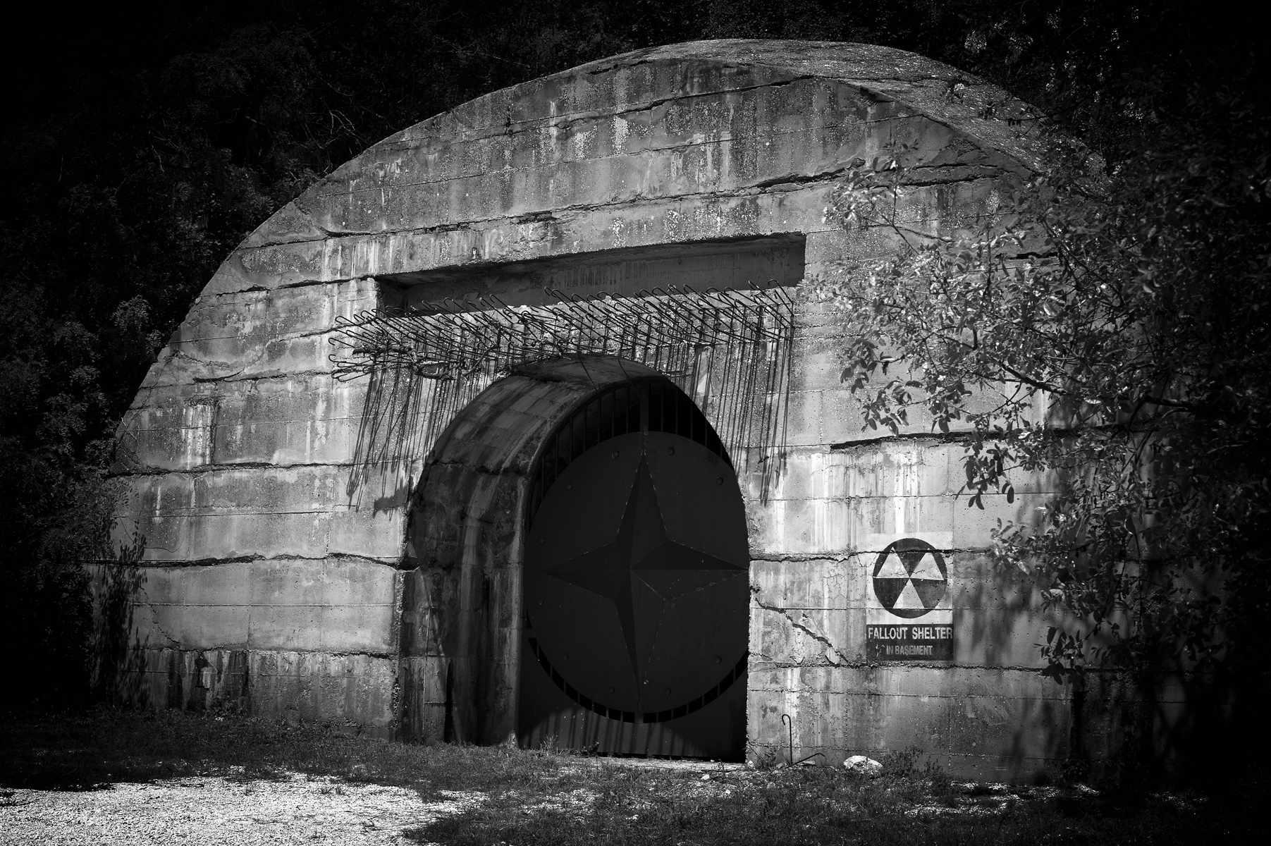 Ingresso Est Bunker antiatomico del monte Soratte